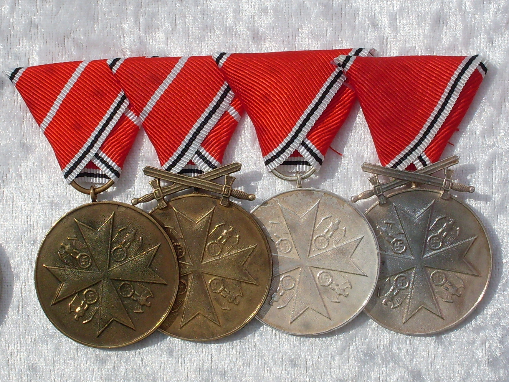 Verdienstmedaille zum Deutschen Adlerorden in Bronze und Silber (mit und ohne Schwerter) am Dreiecksband